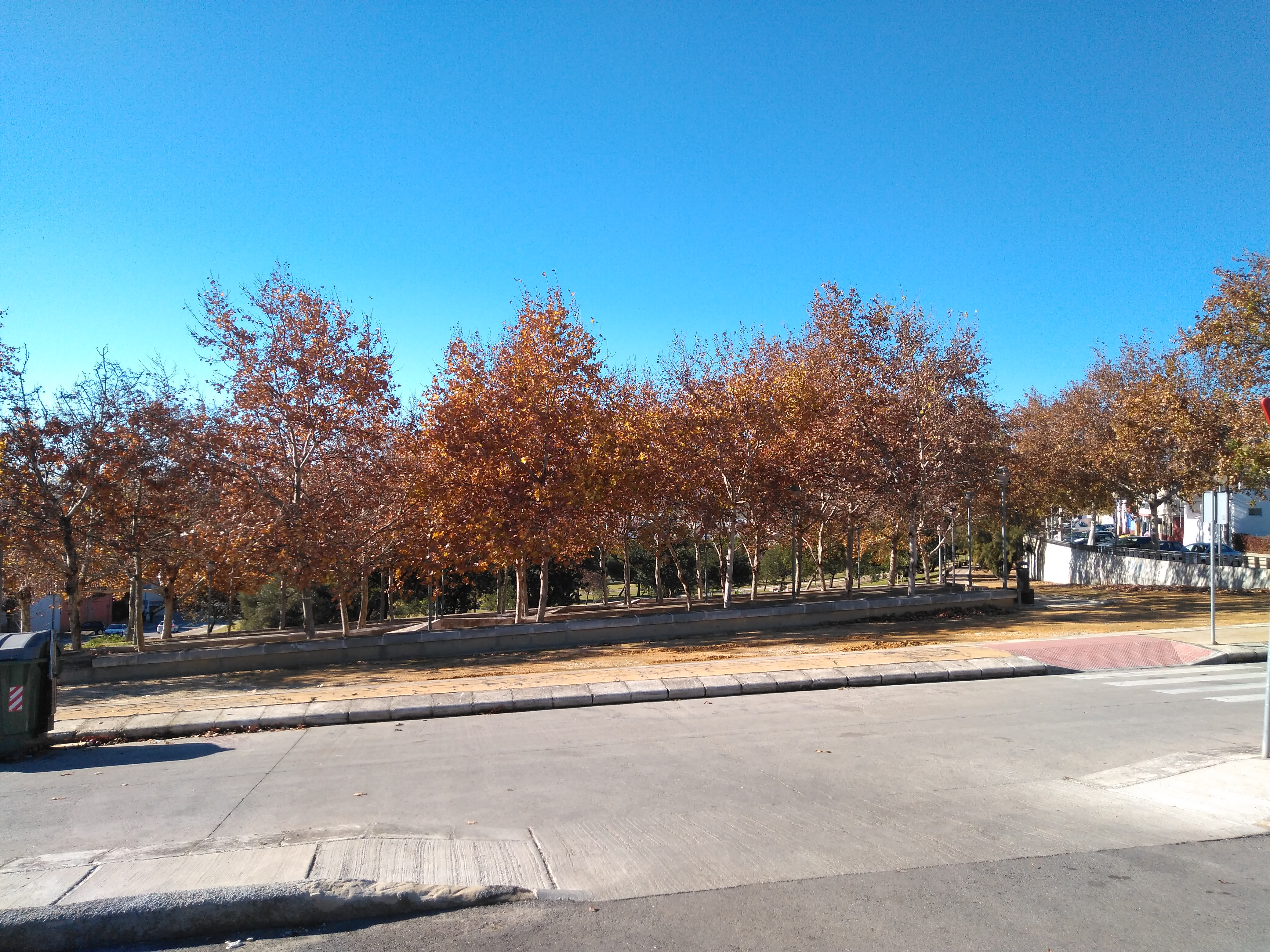 parte superior del Parque de Picadueñas, Jerez de la Frontera